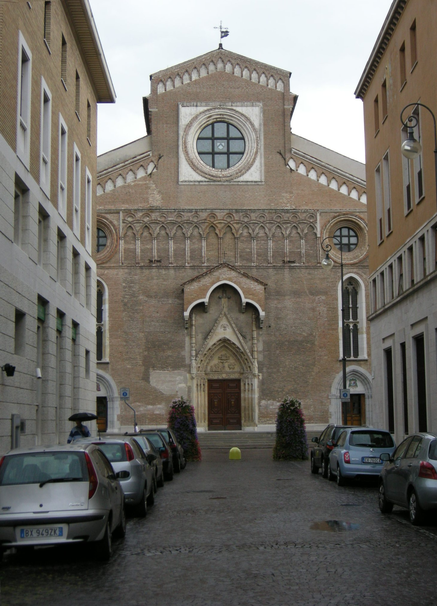 Duomo di Udine, esterno